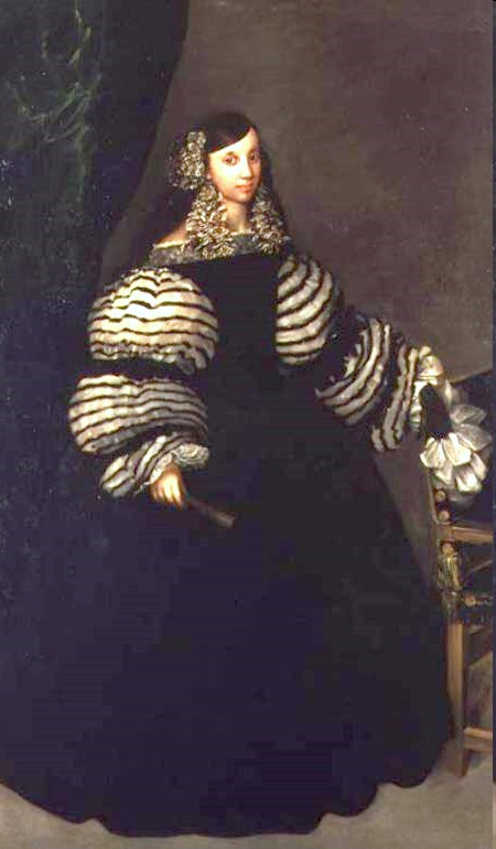 Retrato de una dama desconocida de la Casa de Medinaceli. Anteriormente se creía erróneamente que representaba a la duquesa de Feria.